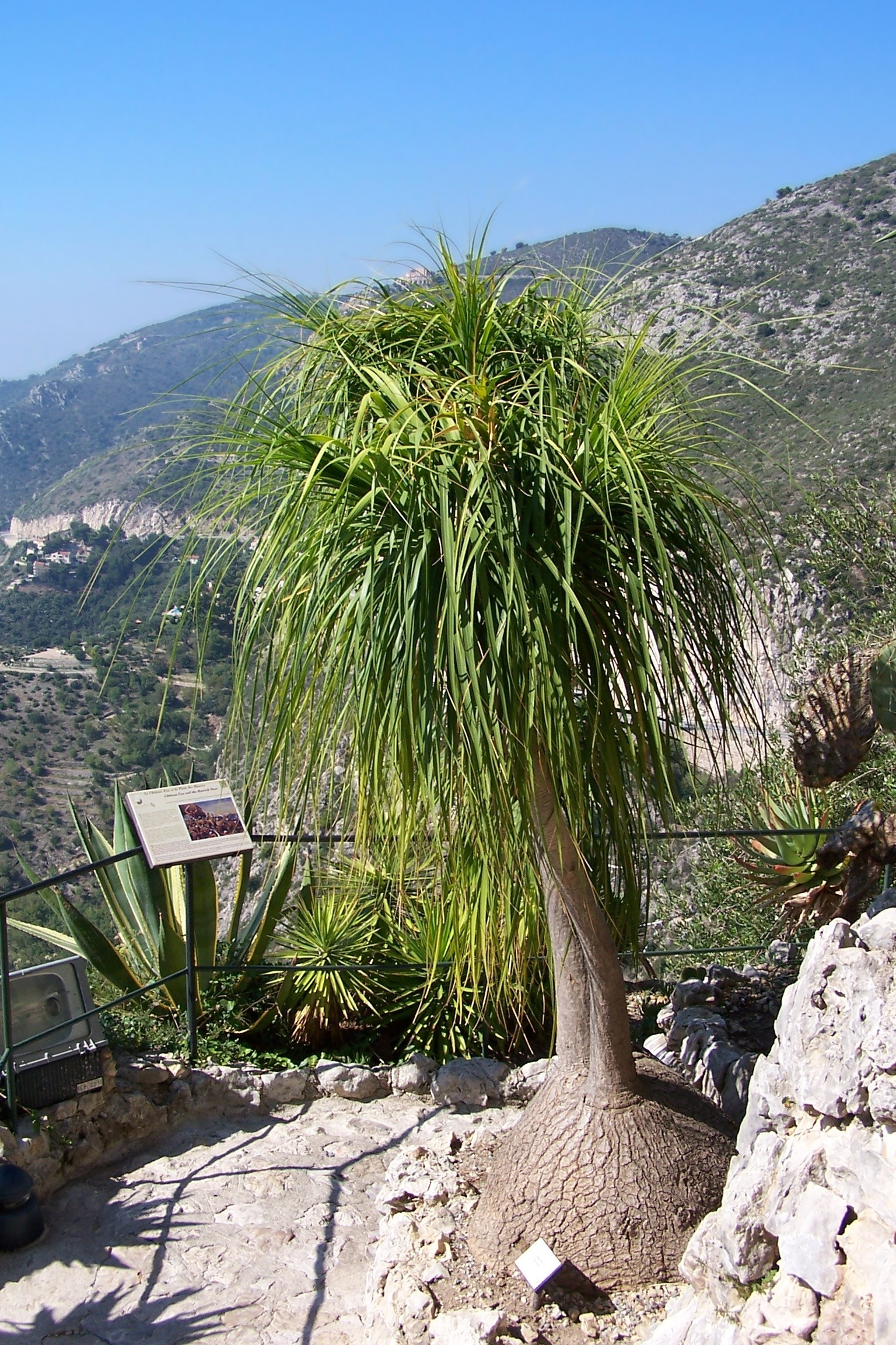 Nolina recurvata im Exotischen Garten von Eze (Alpes-Maritimes, France).